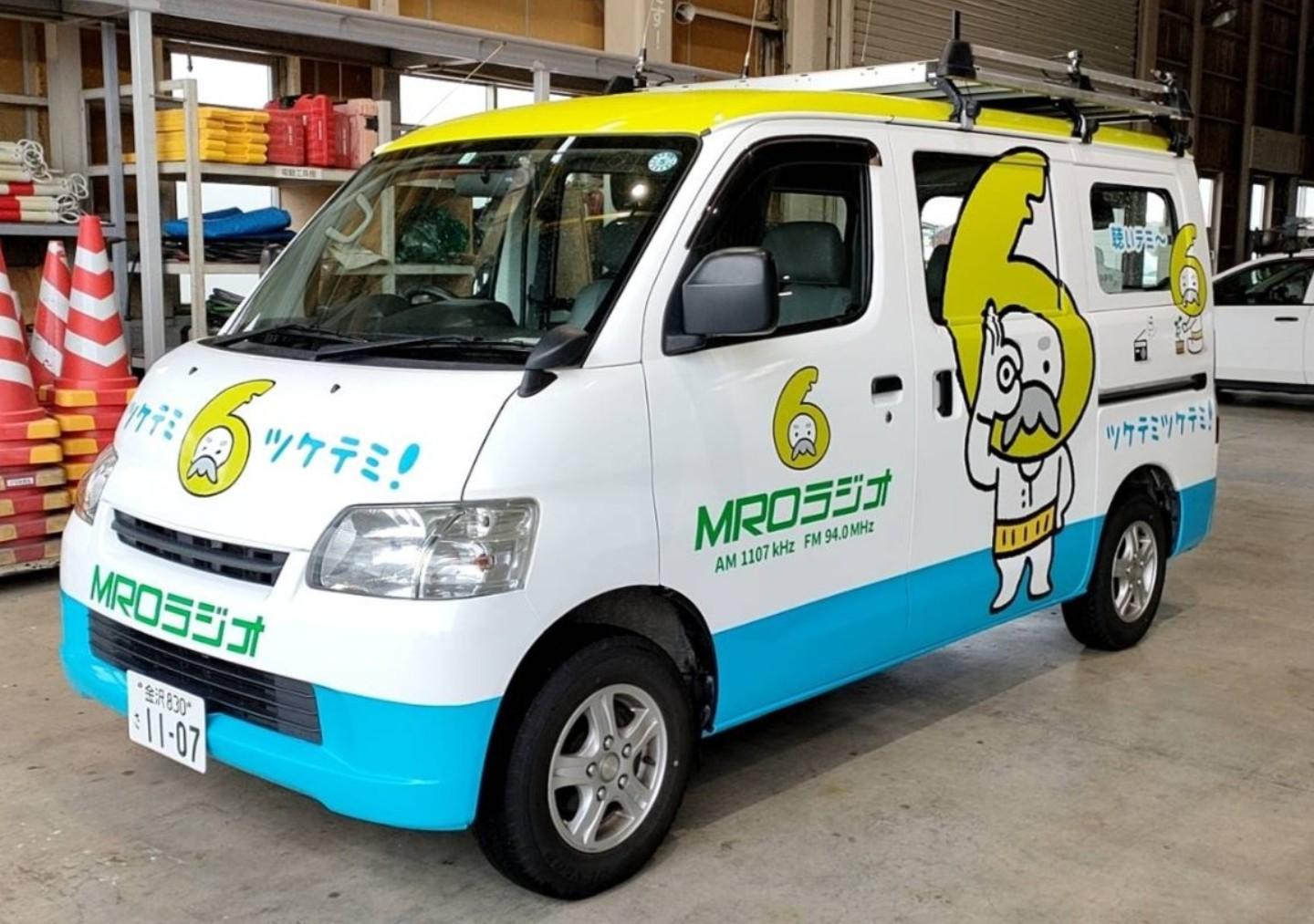 北陸放送のラジオ中継車輌